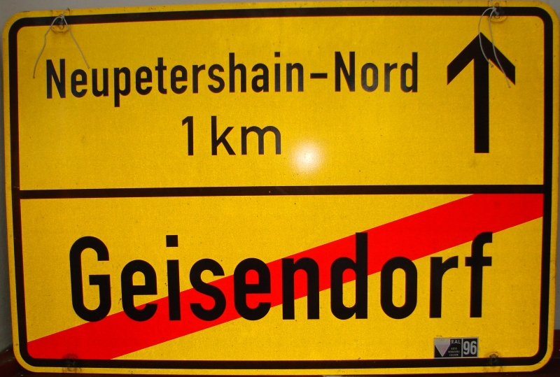 Das Ortsschild des abgebrochenen Dorfes Geisendorf.